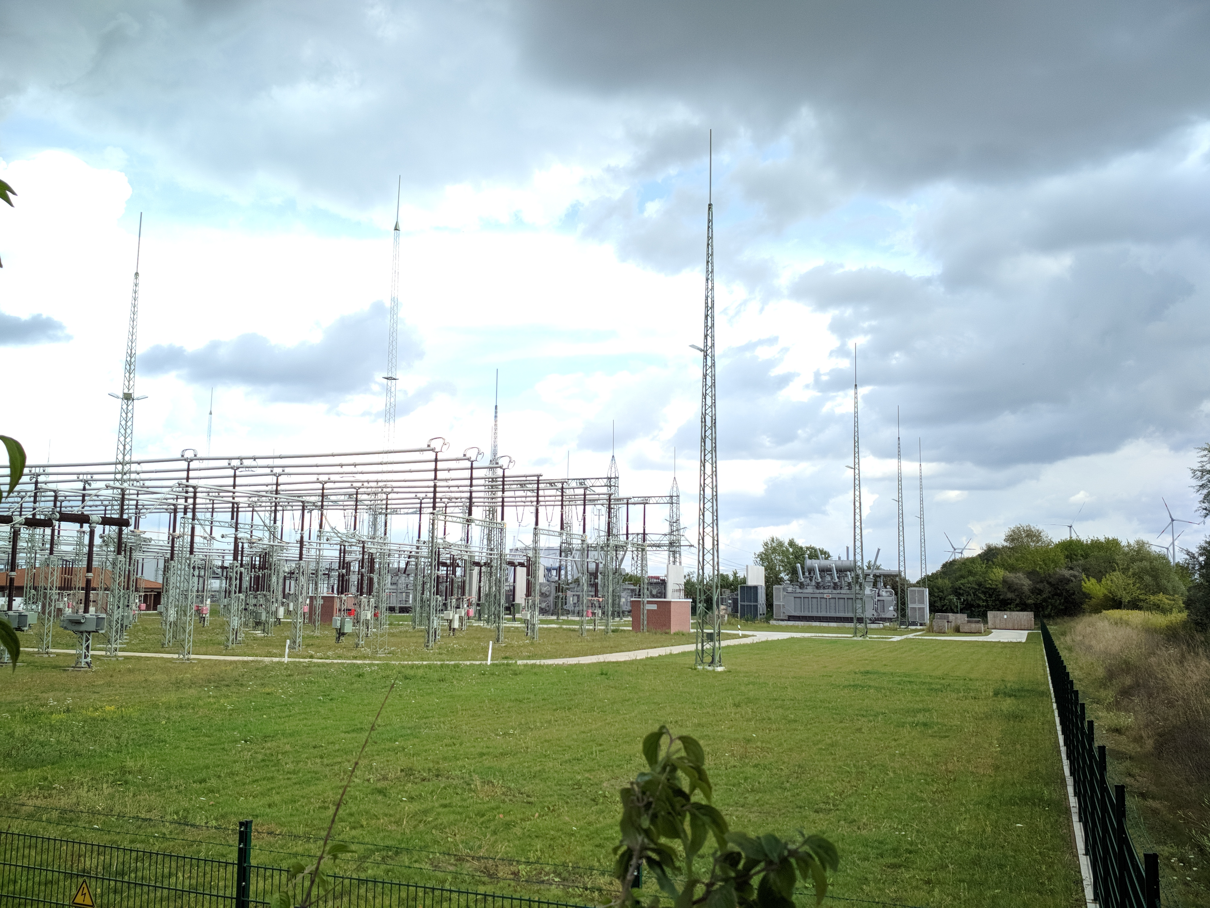 Bentwisch HGÜ